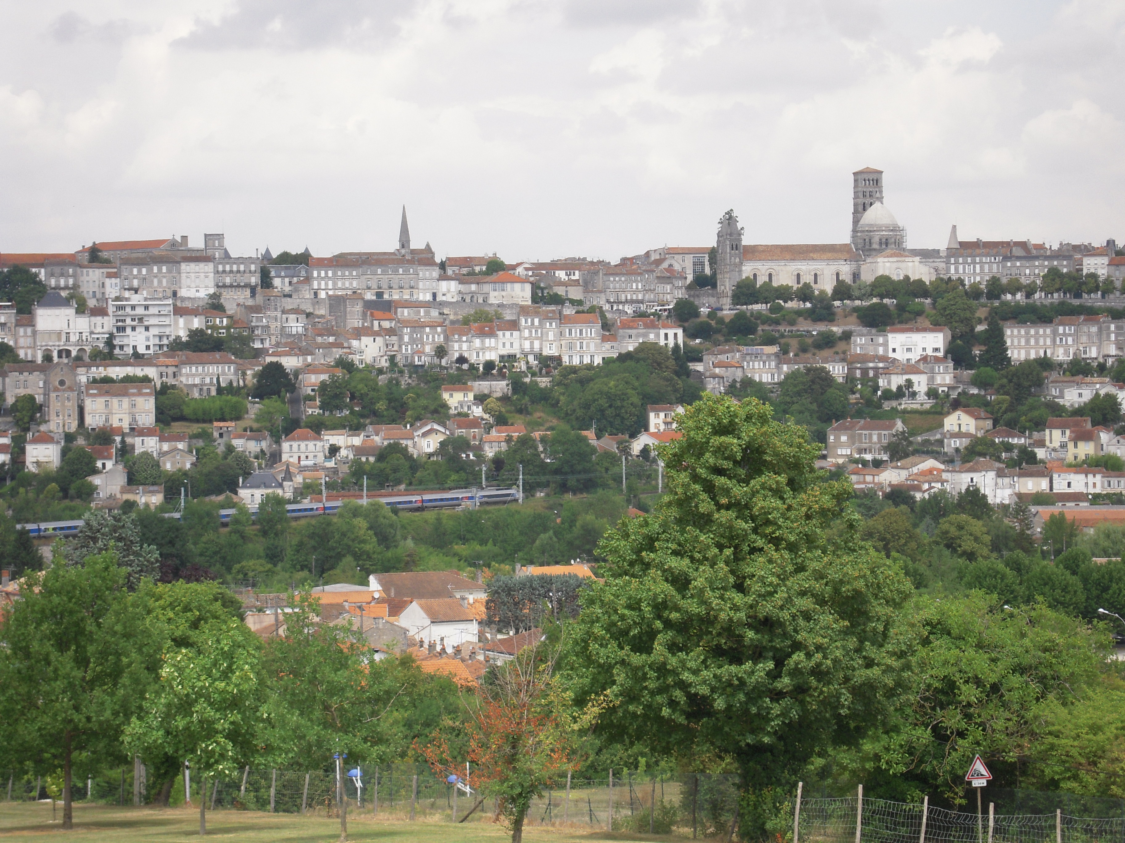 Angoulême est une ville encore méconnue qui possède pourtant une histoire très riche et des personnages illustres. Devenue préfecture de la Charente, Angoulême est une provinciale assagie. C’est une ville tranquille, baignée de lumière, chargée d’histoire et dont les maisons sont faites de cette belle pierre blanche. Perchée sur son plateau elle est surnommée le balcon du Sud-Ouest.